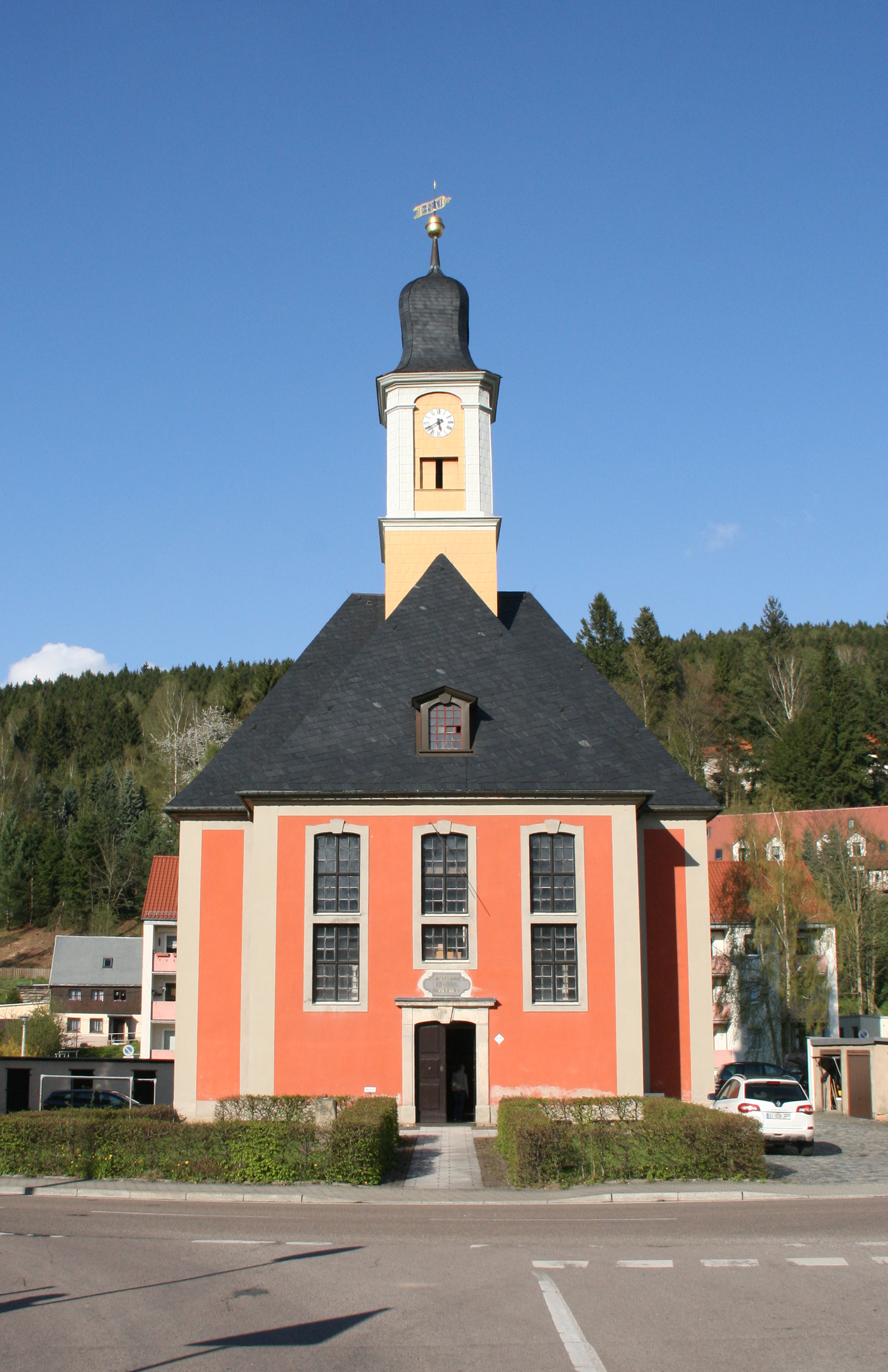 Schmiedeberg (Erzgebirge), Dreifaltigkeitskirche, Außenansicht mit Eingang und zentralem Glockenturm